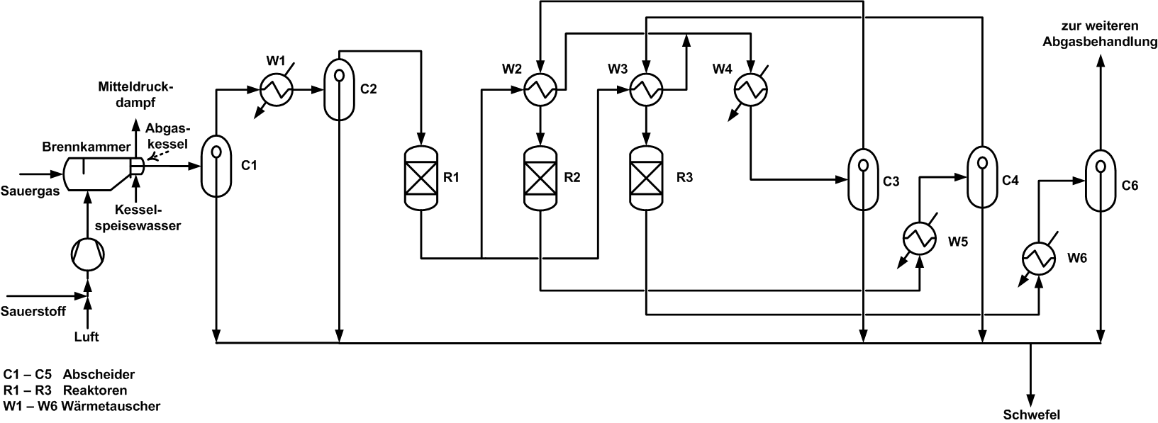 Claus-Prozess